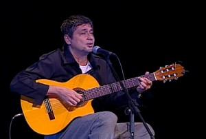 Cantor brasileiro Zé Renato em imagem do acervo da TV Brasil.